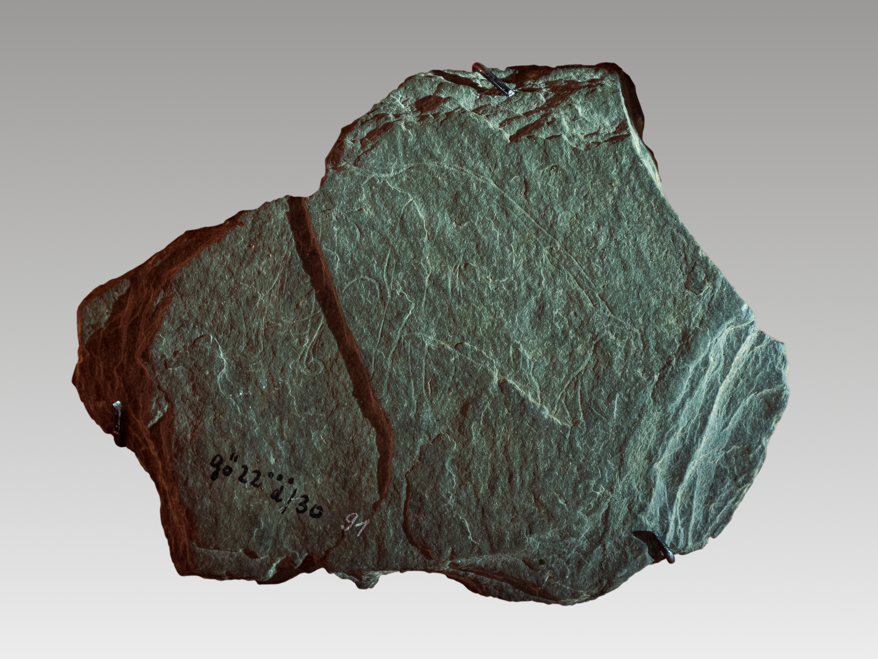 Magdalénienzeitlicher Fundplatz Gönnersdorf: Schieferplatte Nr. 91 mit zwei hintereinander angeordneten Mammuten. Original, Museum Monrepos, Neuwied.